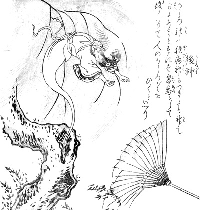 Ushirogami (後神) from the Konjaku Hyakki Shūi (今昔百鬼拾遺)